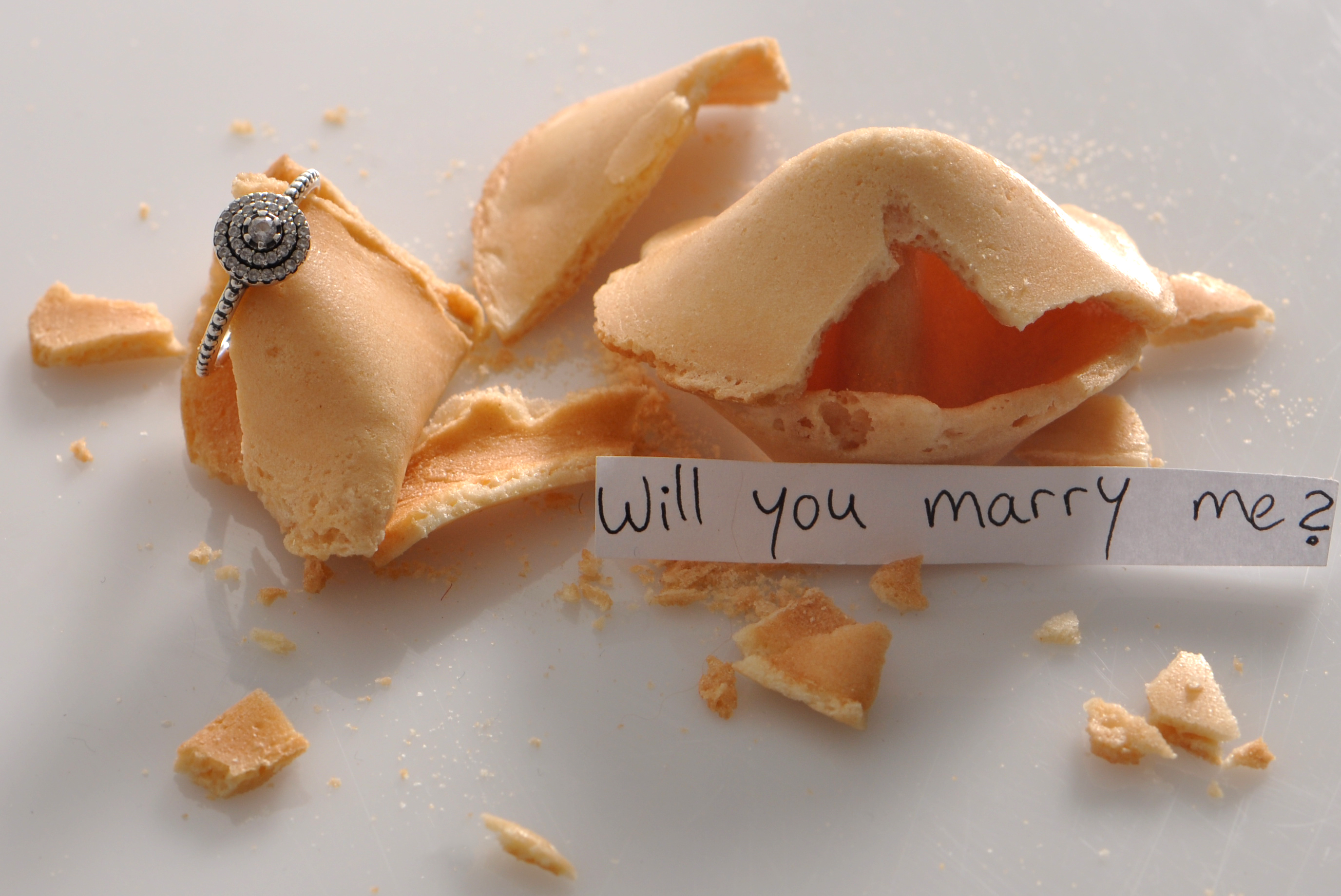 אוראל המאוי ,תיכון רוטברג, הצעה